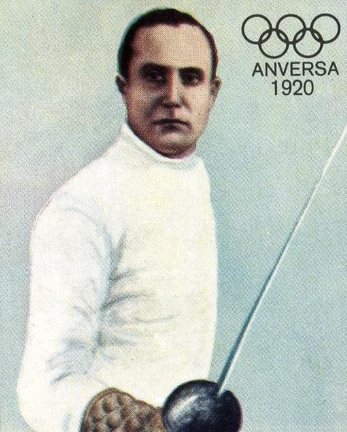 Nedo Nadi - Campioni dello Sport 1968-1969, n°419